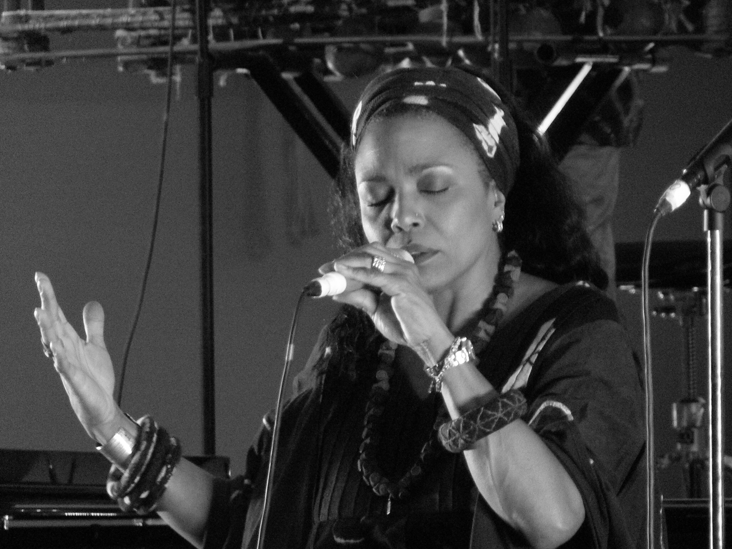 Dee Dee Bridgewater en concert à Thiais dans le Val de Marne, France.